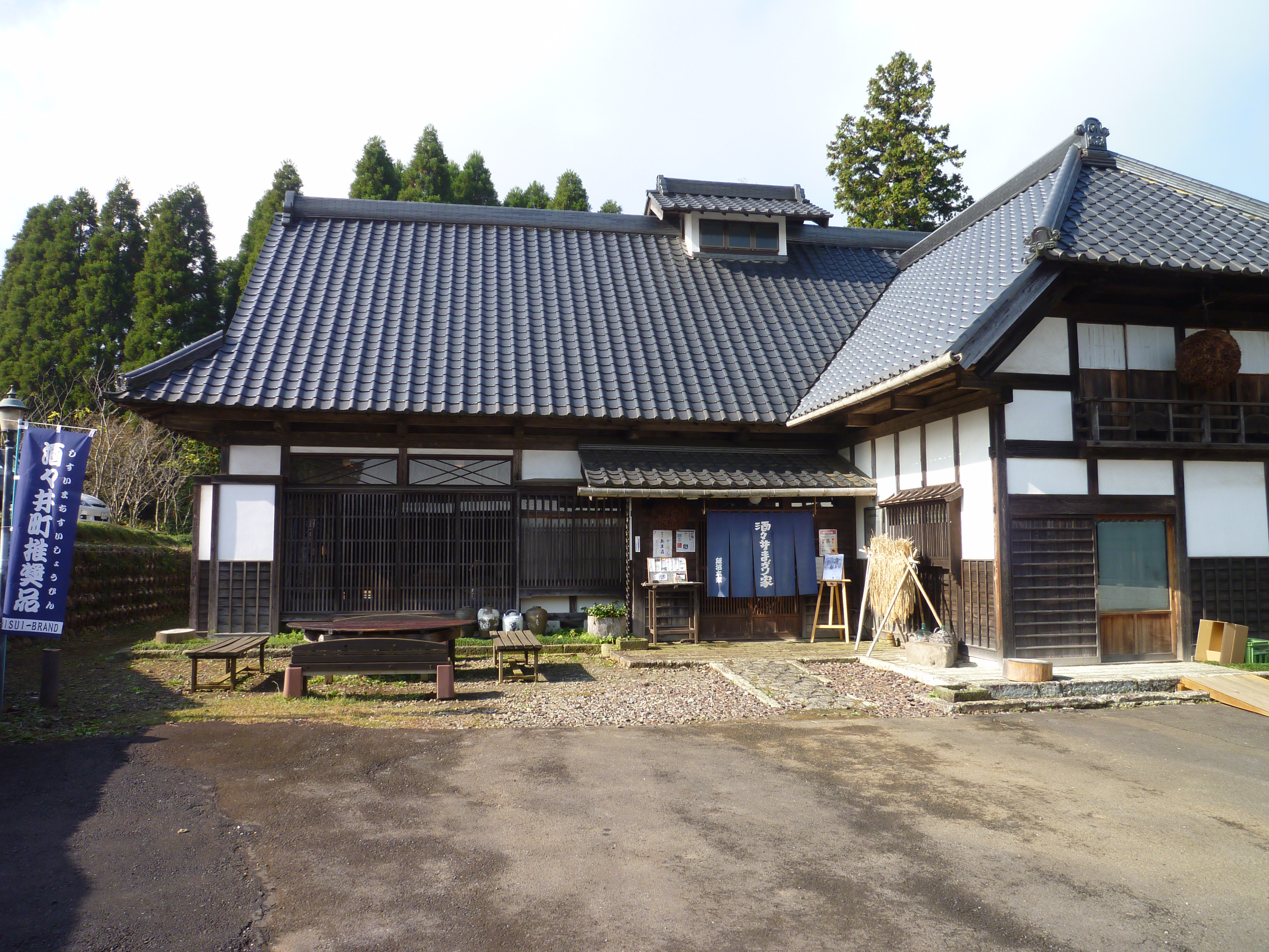 飯沼本家 酒々井まがり家